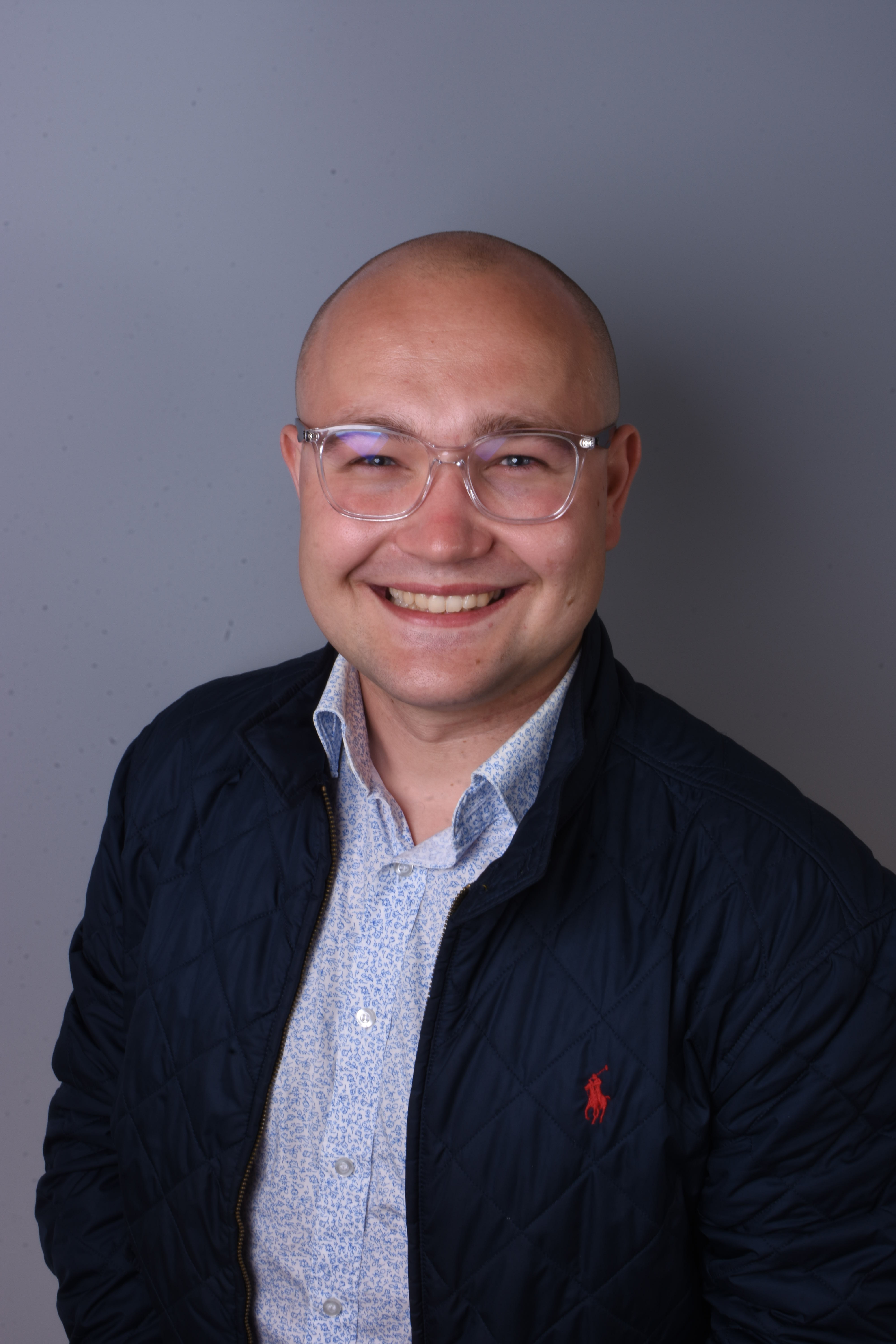 MUDr. Vojtěch Hrček